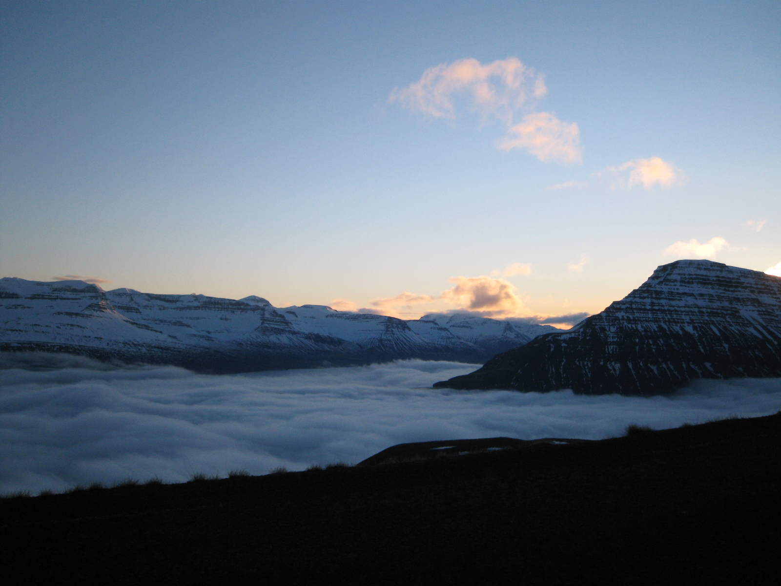 Paisaxe con néboa, Reydarfjördur, Islandia 2007